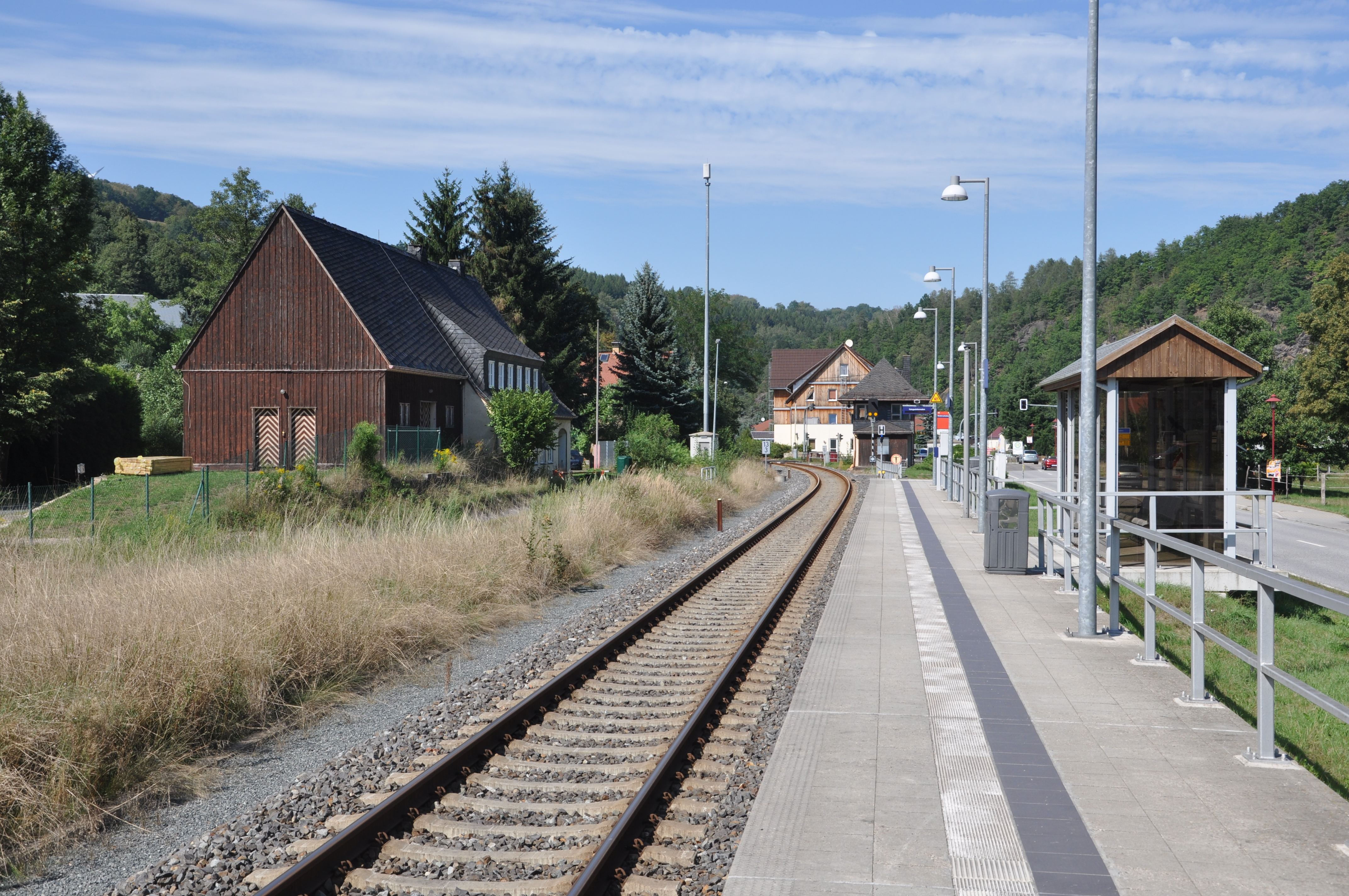 Haltepunkt Niederschlottwitz, Müglitztalbahn